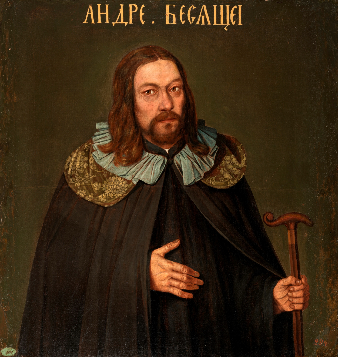 Неизвестный художник последней четверти XVII века. Школа Оружейной палаты. Портрет Андрея Бесящего — Андрея Матвеевича Апраксина, члена коллегии Всепьянейшего сумасброднейшего собора всешутейшего князь-папы. Не ранее октября 1696 – не позднее 30 августа 1698. Холст, масло. Из так называемой «Преображенской серии». Его можно датировать 1690-ми годами, так как персонаж изображен еще с бородкой ношение которой позднее было строжайше запрещено Петром.